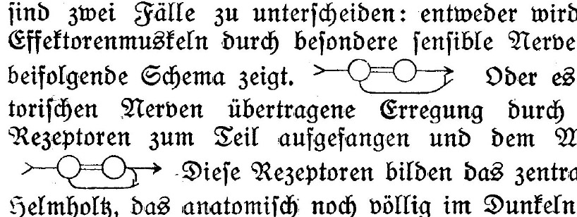 Zirkuläre Schemen